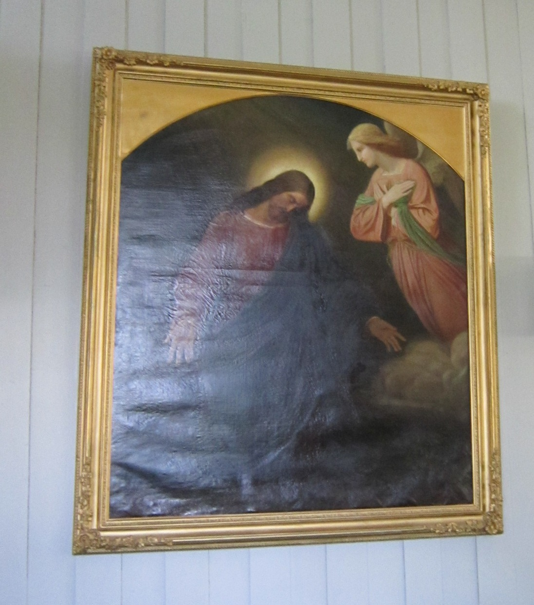 Tidligere alterbilde i Vinger kirke, malt av Christen Brun